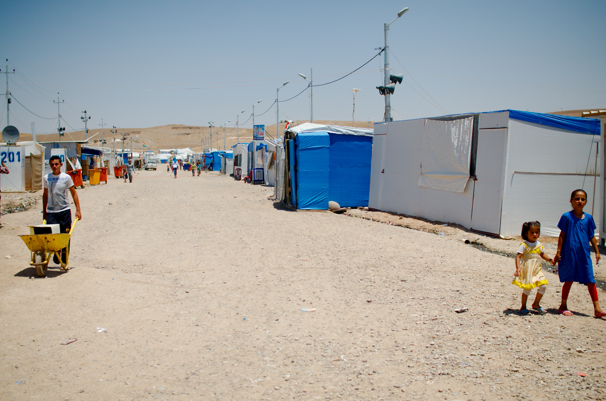 Kurdistan (Nord-Irak) Juni 2014